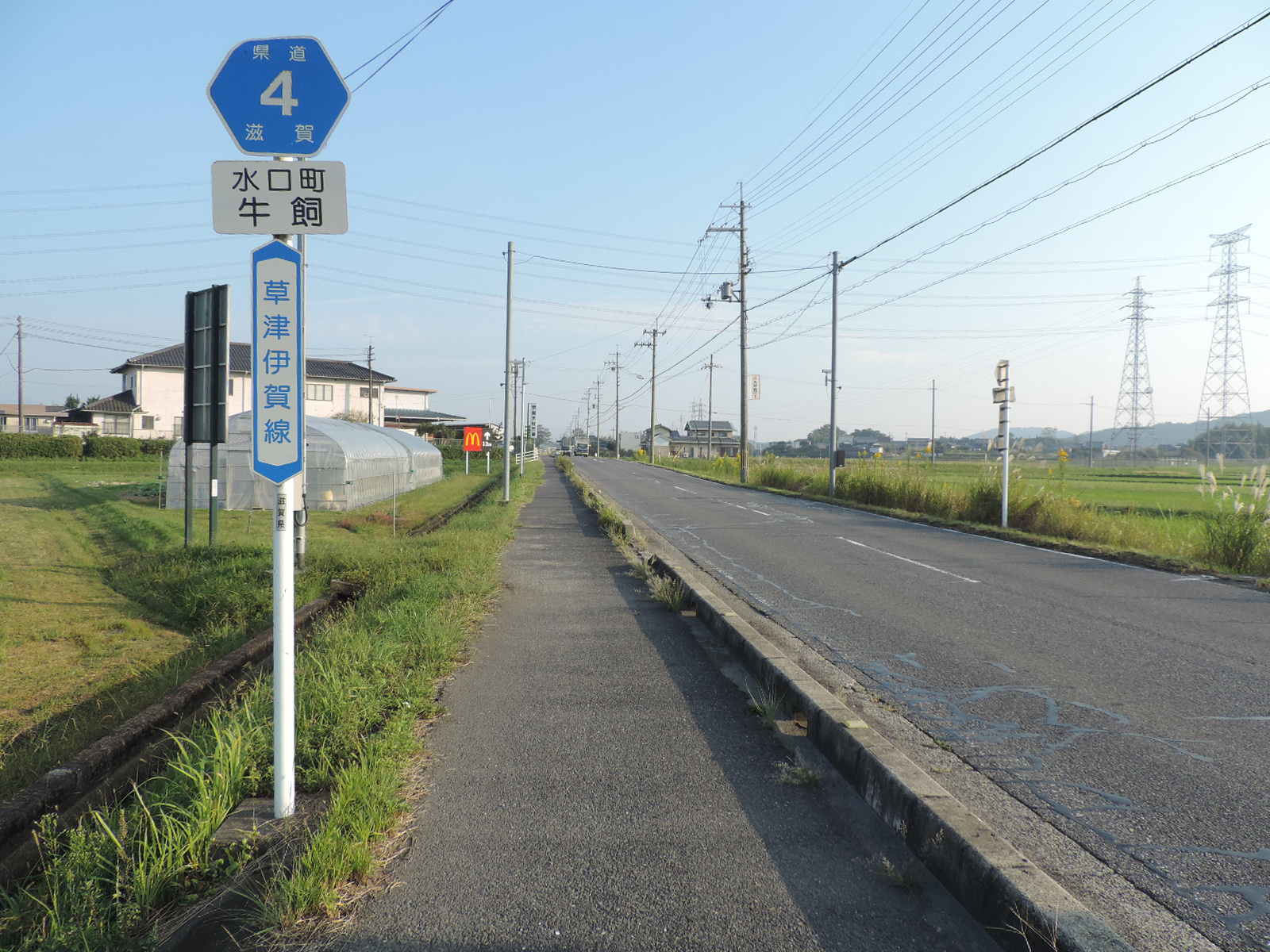 滋賀県道・三重県道4号草津伊賀線。滋賀県甲賀市水口町牛飼にて。